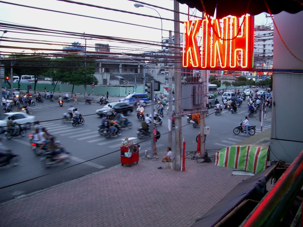 Pham Ngu Lao Street in Saigon